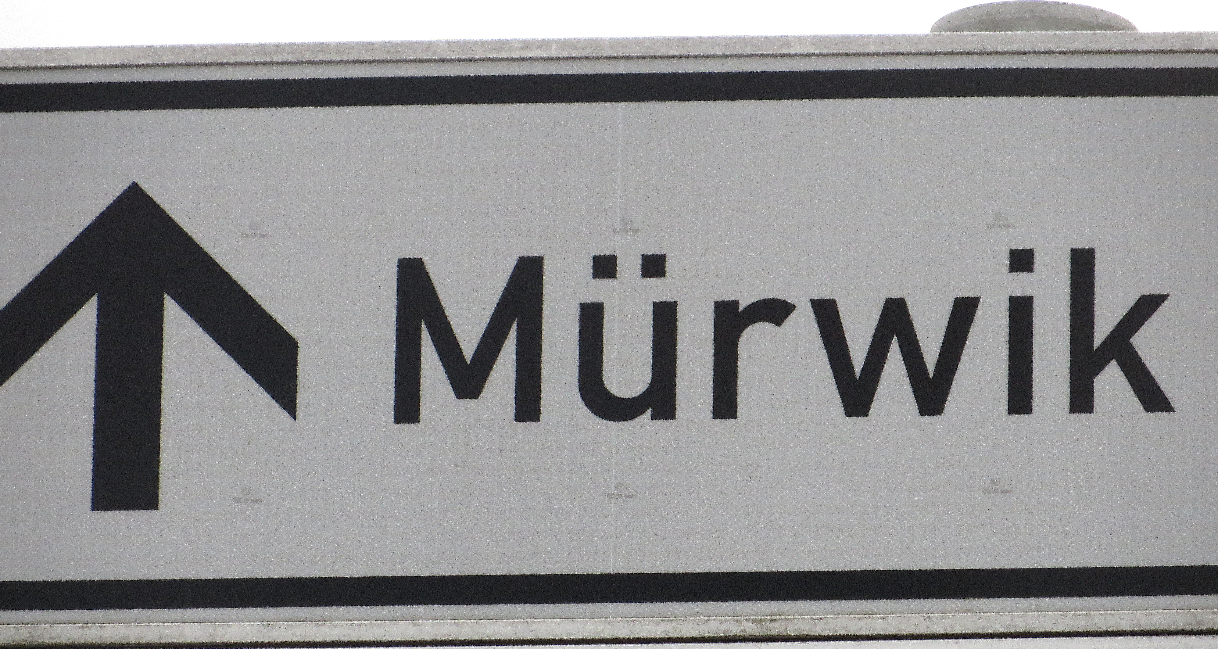 Straßenschild nach Mürwik bei Engelsby, Bild 06